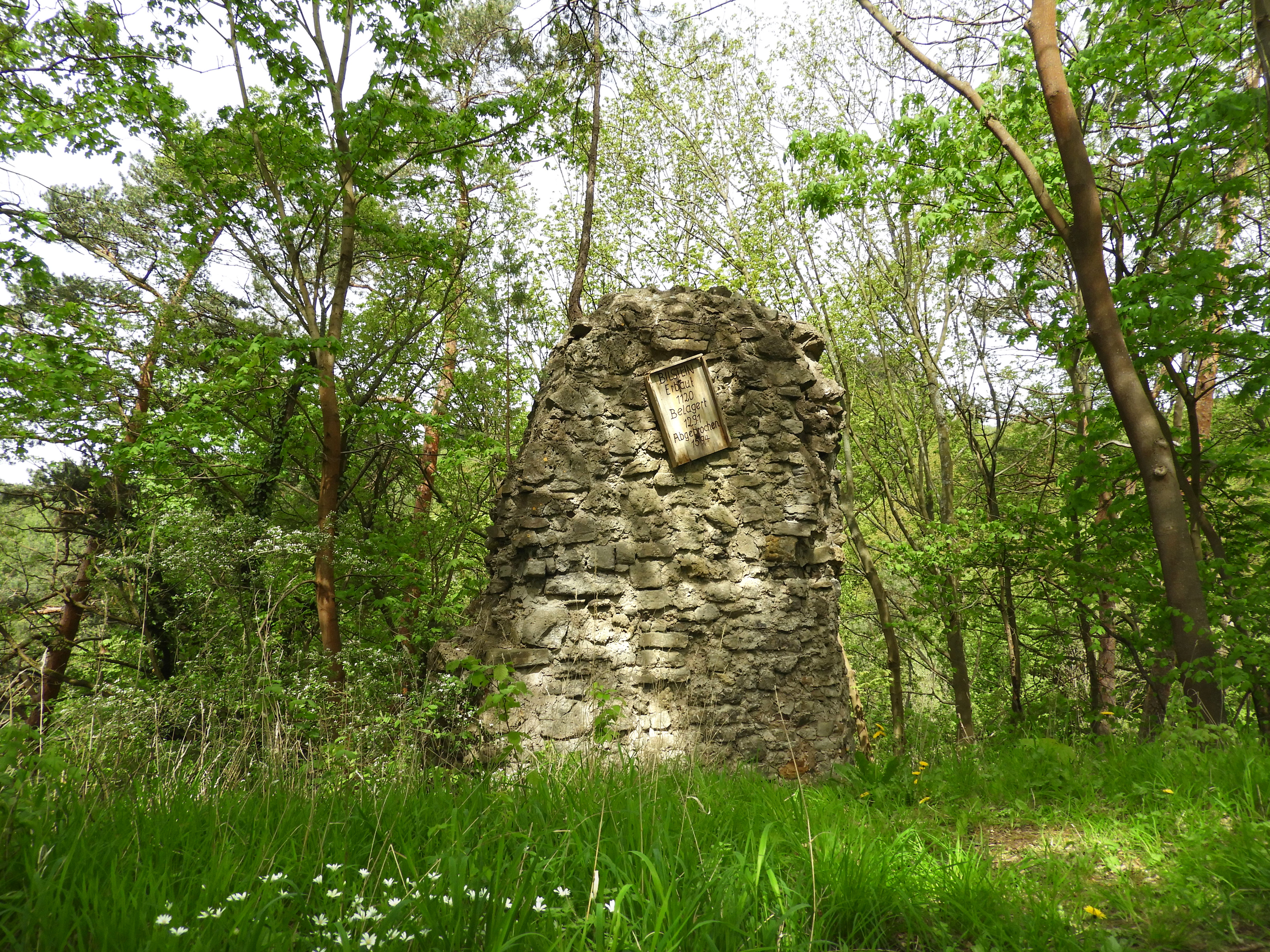 Turmstumpf, der 1970 durch Befestigungsarbeiten vor dem Verfall gerettet wurde. Die Geschichte der Burganlage, Stammsitz der einst bedeutenden Grafen Bilstein, geht bis in das Jahr 1120 zurück. Die einstige Grafenburg, die hier im frühen Mittelalter einen beherrschenden Platz einnahm, wurde wegen Baufälligkeit 1594 von den Landgrafen von Hessen abgerissen. Heute sind nur noch Mauerreste sichtbar. Die Burgruine Bilstein ist Kulturdenkmal aufgrund ihrer geschichtlichen Bedeutung. Der Bilstein liegt im östlichen Meißnervorland, im Gemeindegebiet des Eschweger Stadtteils Albungen im nordhessischen Werra-Meißner-Kreis. Das Gebiet gehört zum Geo-Naturpark Frau-Holle-Land.